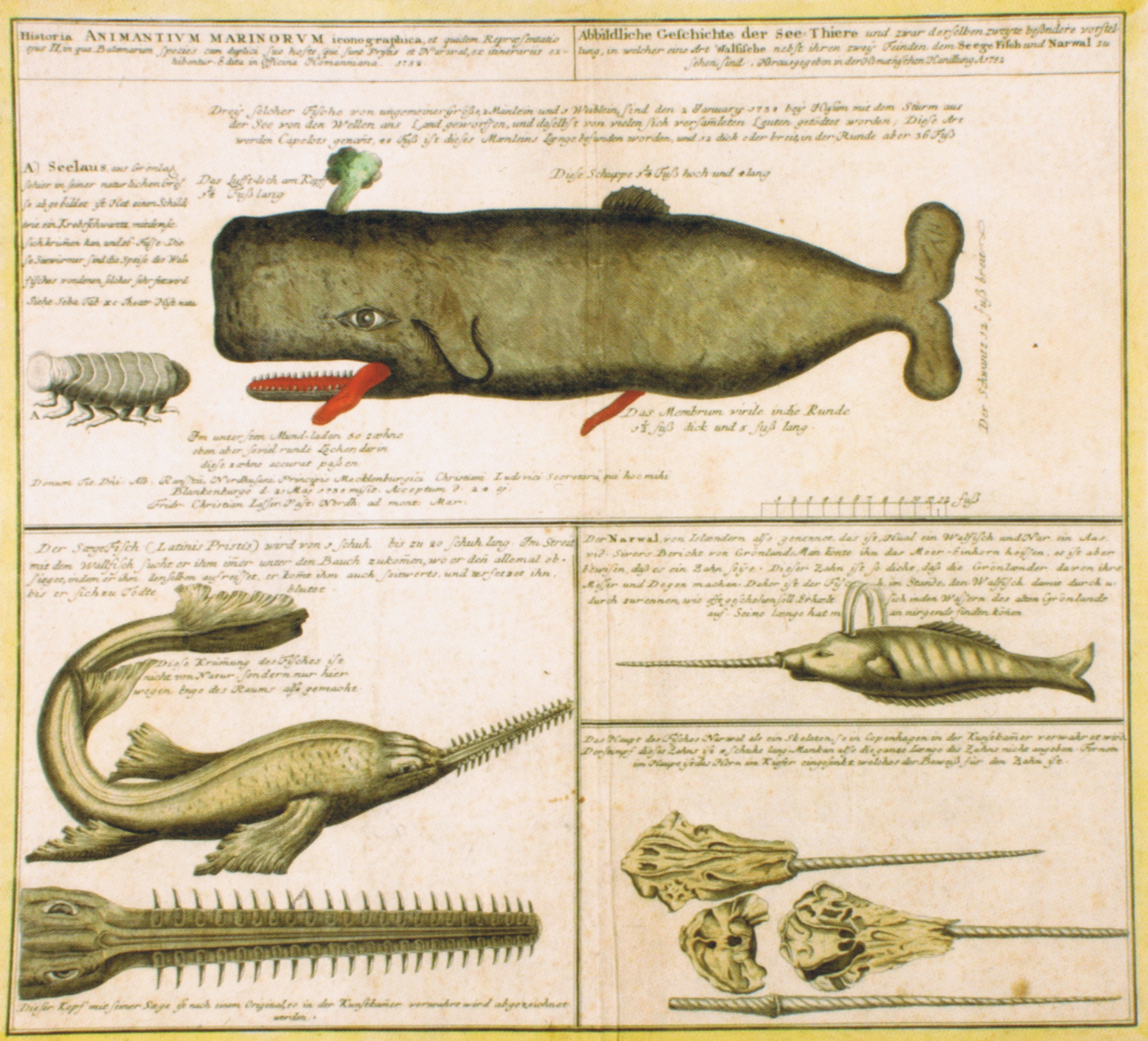 Pottwal, Narwal und Schwertfisch, Kupferstich von 1738